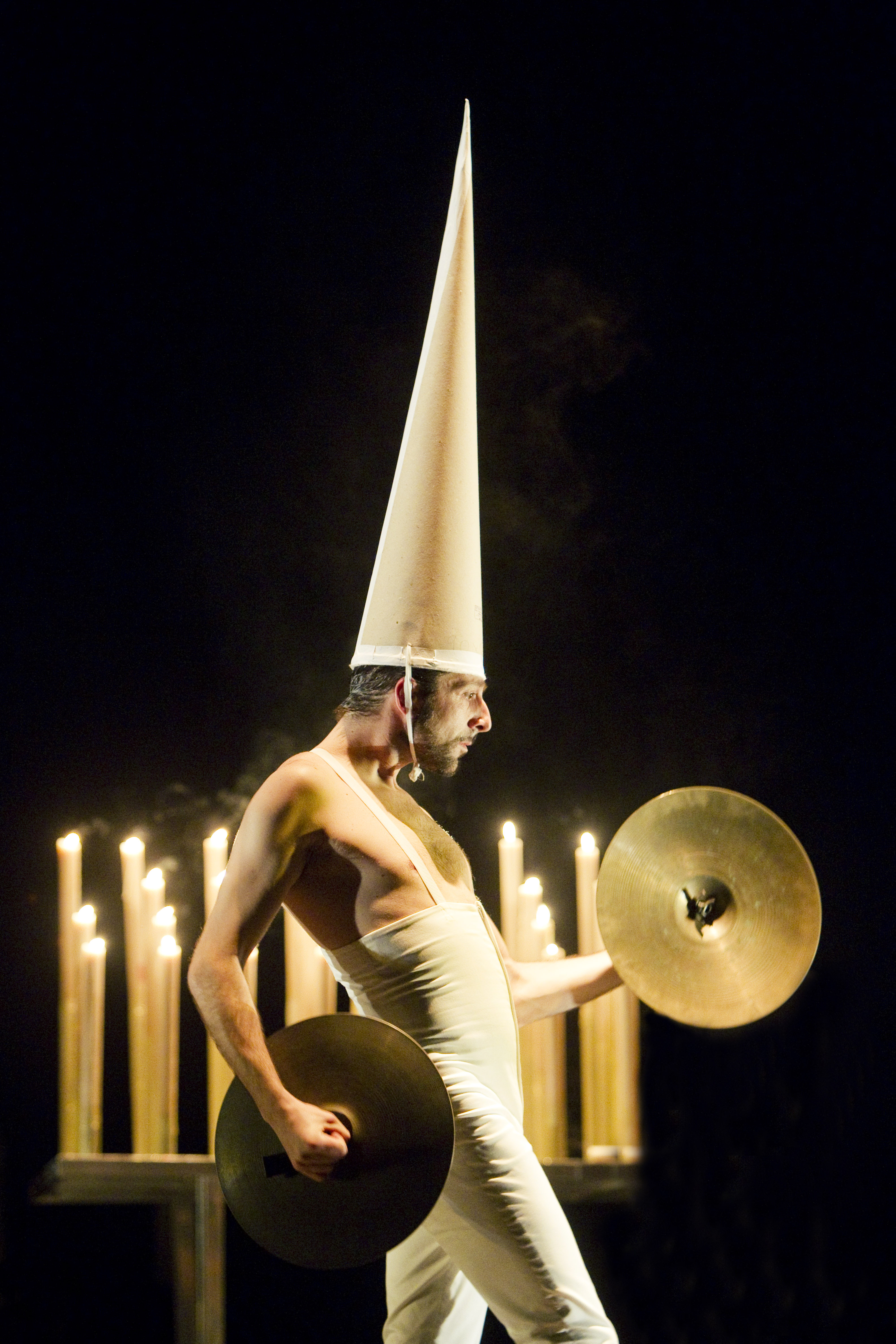 Imagen de Andrés Marín en "La Pasión según se mire"